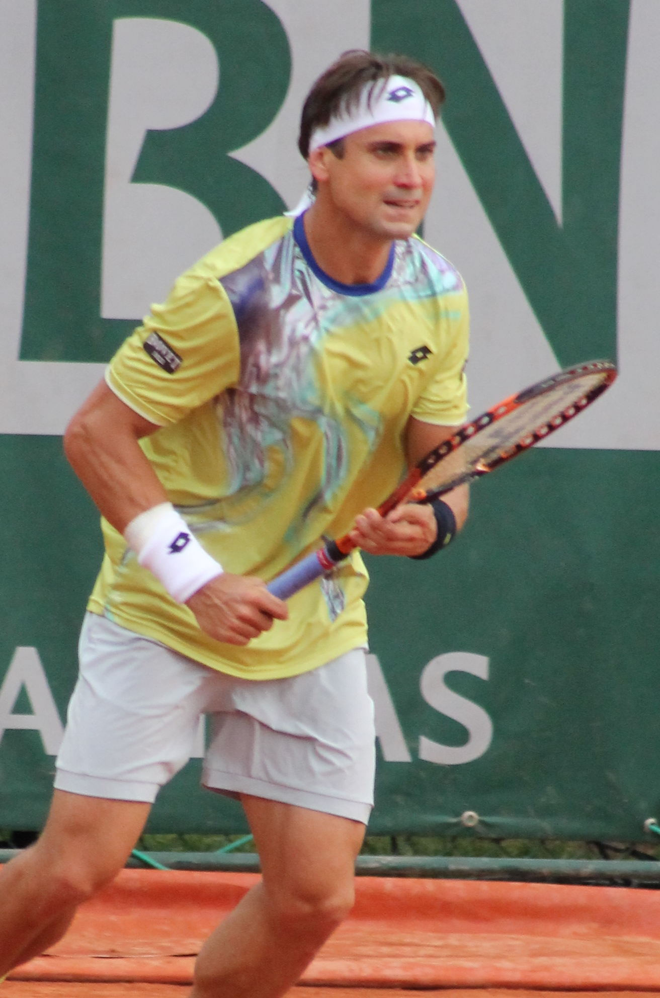 Ferrer RG15 (14)